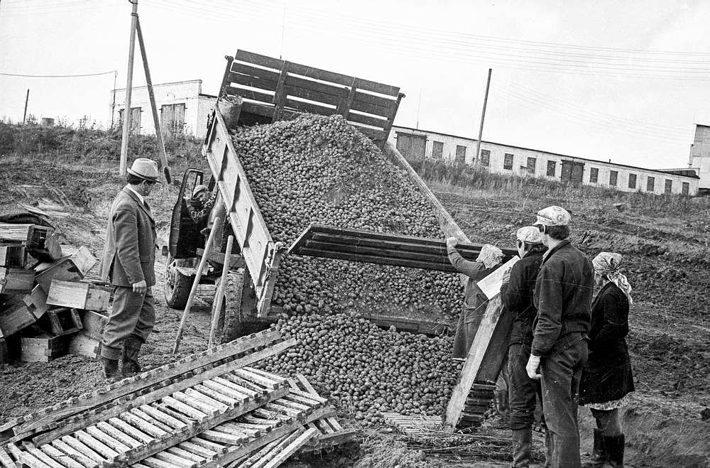 Механизаторы Владимир Владимирович Кузьмин и Дмитрий Иванович Наумов закладывают бурт картофеля в совхозе «Новое». Село Новое, Переславский район. (Переславский музей-заповедник, отдел истории советского общества, конверт 1086. По газетному списку номер 52.)